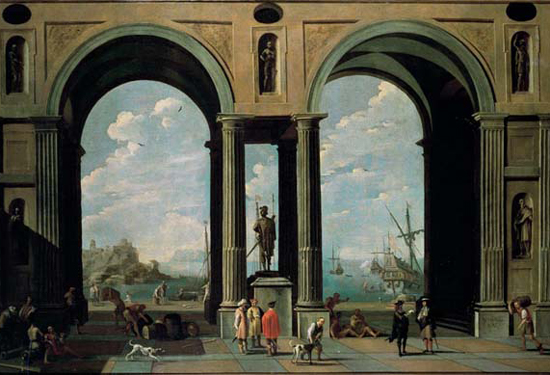 El lienzo, que es obra de finales del siglo XVII, lleva por título Perspectiva con puerto.